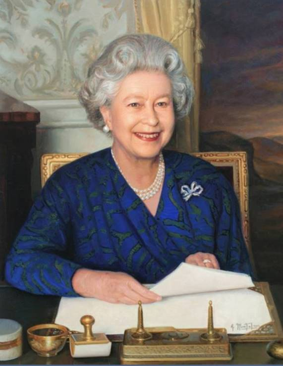 Óleo sobre lienzo 2002, Palacio de Buckingham (Londres)